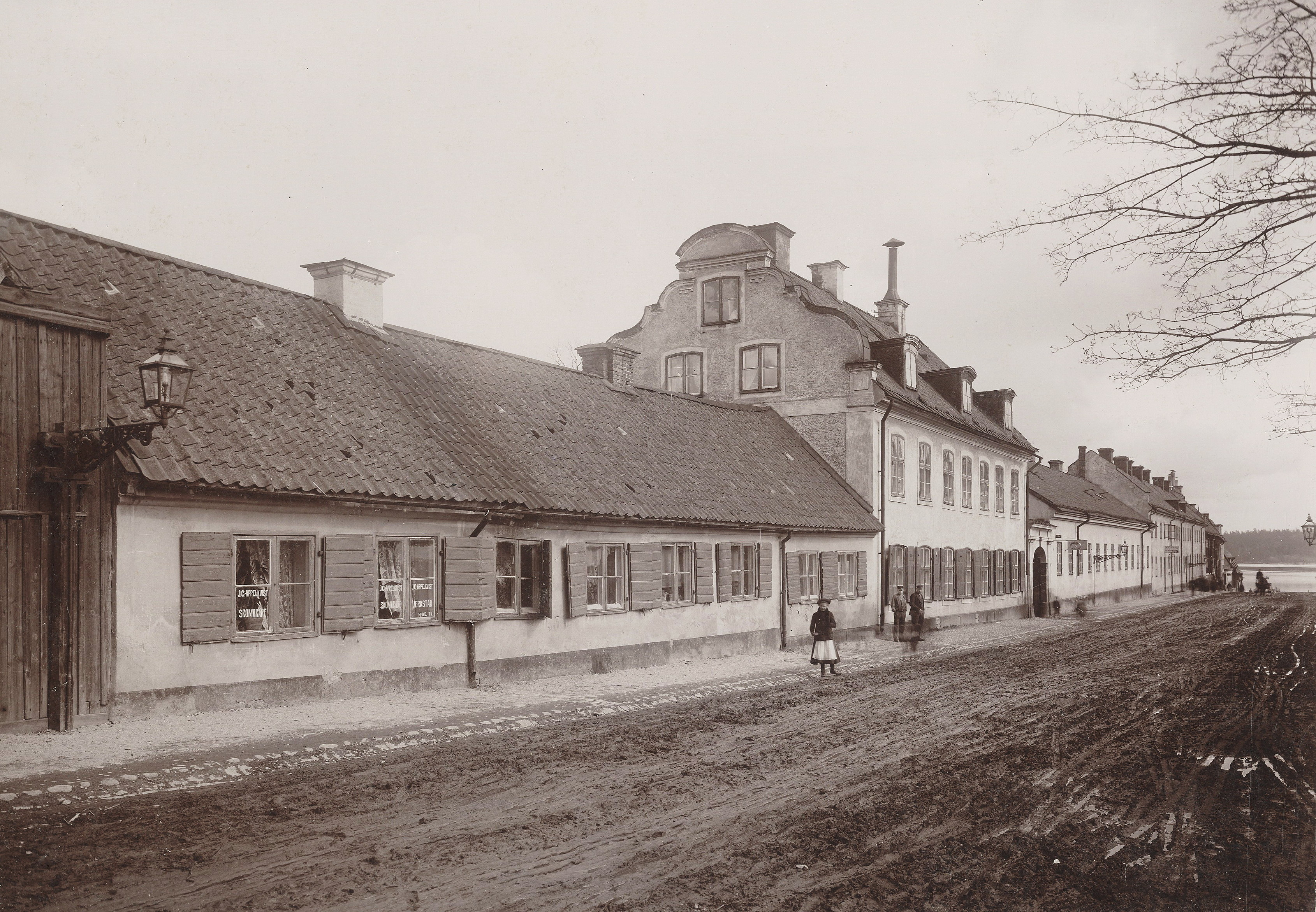 Dagens Malmgårdsvägen nr 55-61